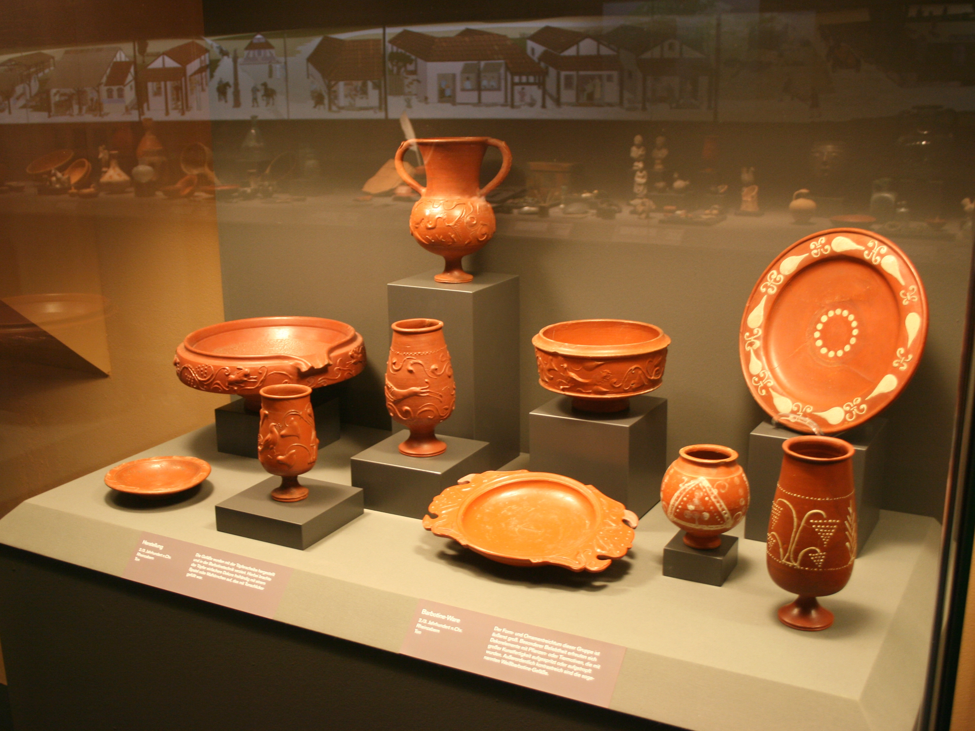 Ausstellung besonders qualitätvoller Rheinzaberner Terra Sigillata im Historischen Museum der Pfalz Speyer.